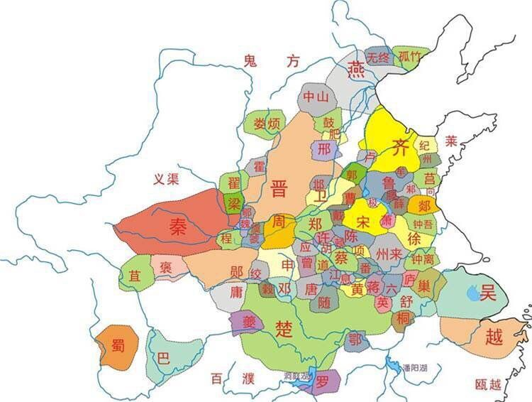 春秋时代地图